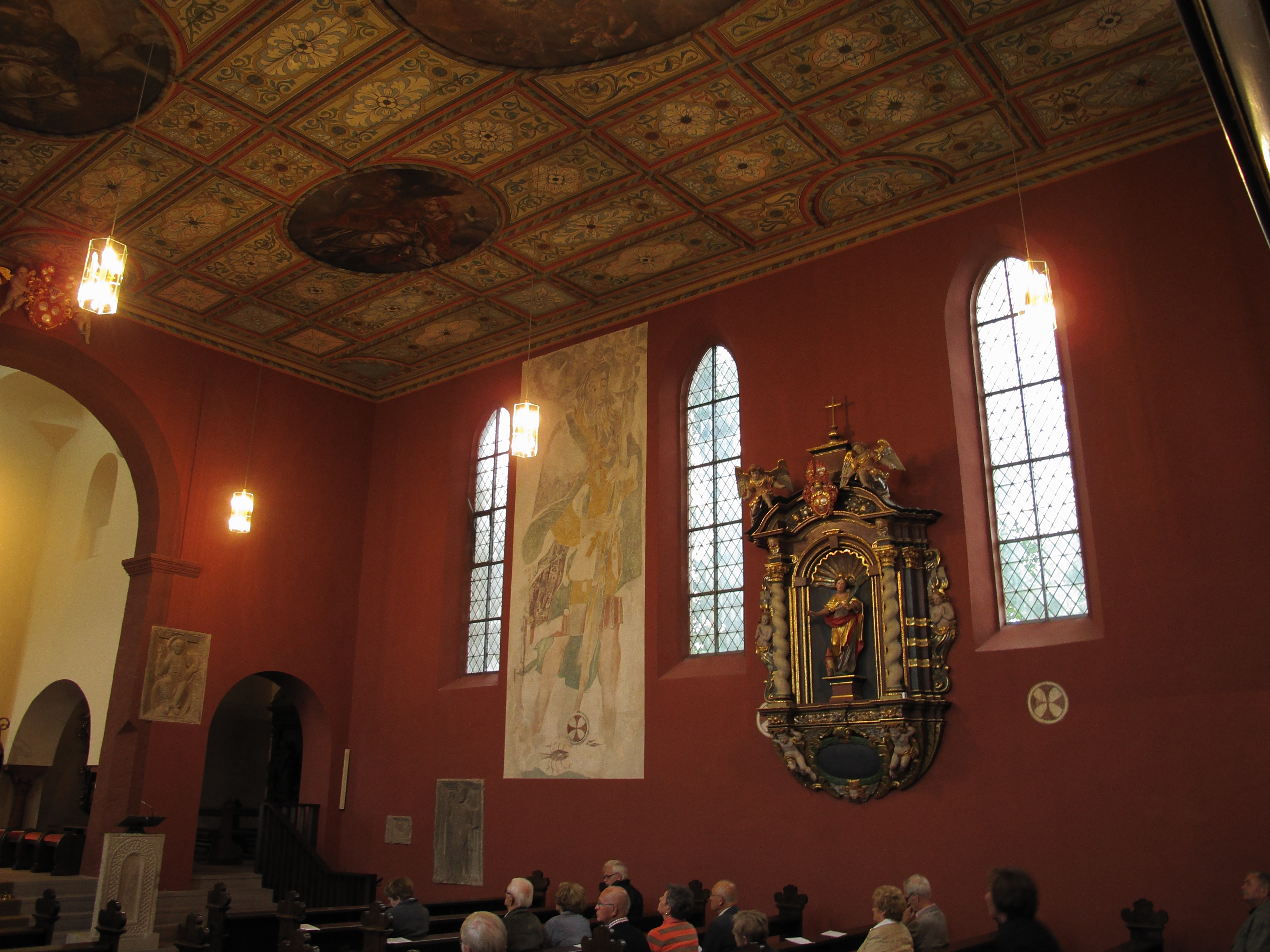 Petersberg - St.Peter (Liobakirche): Innenansicht nach Südosten